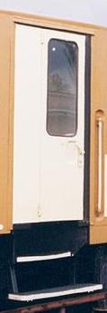 drzwi skrzydłowo-łamane (z wagonu bagażowego).